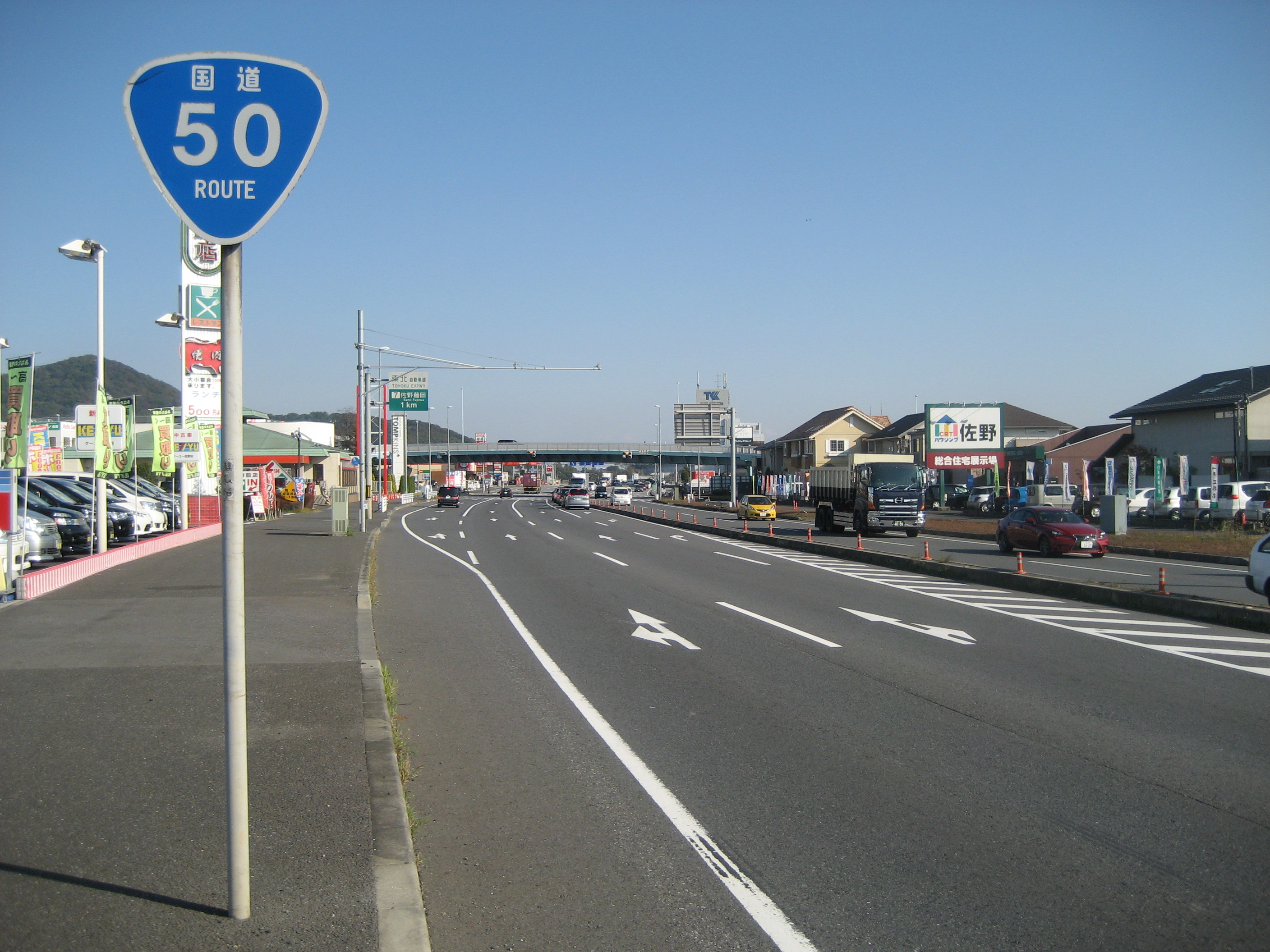 国道50号線栃木県佐野市高萩町（佐野新都市）付近（小山方面を撮影）